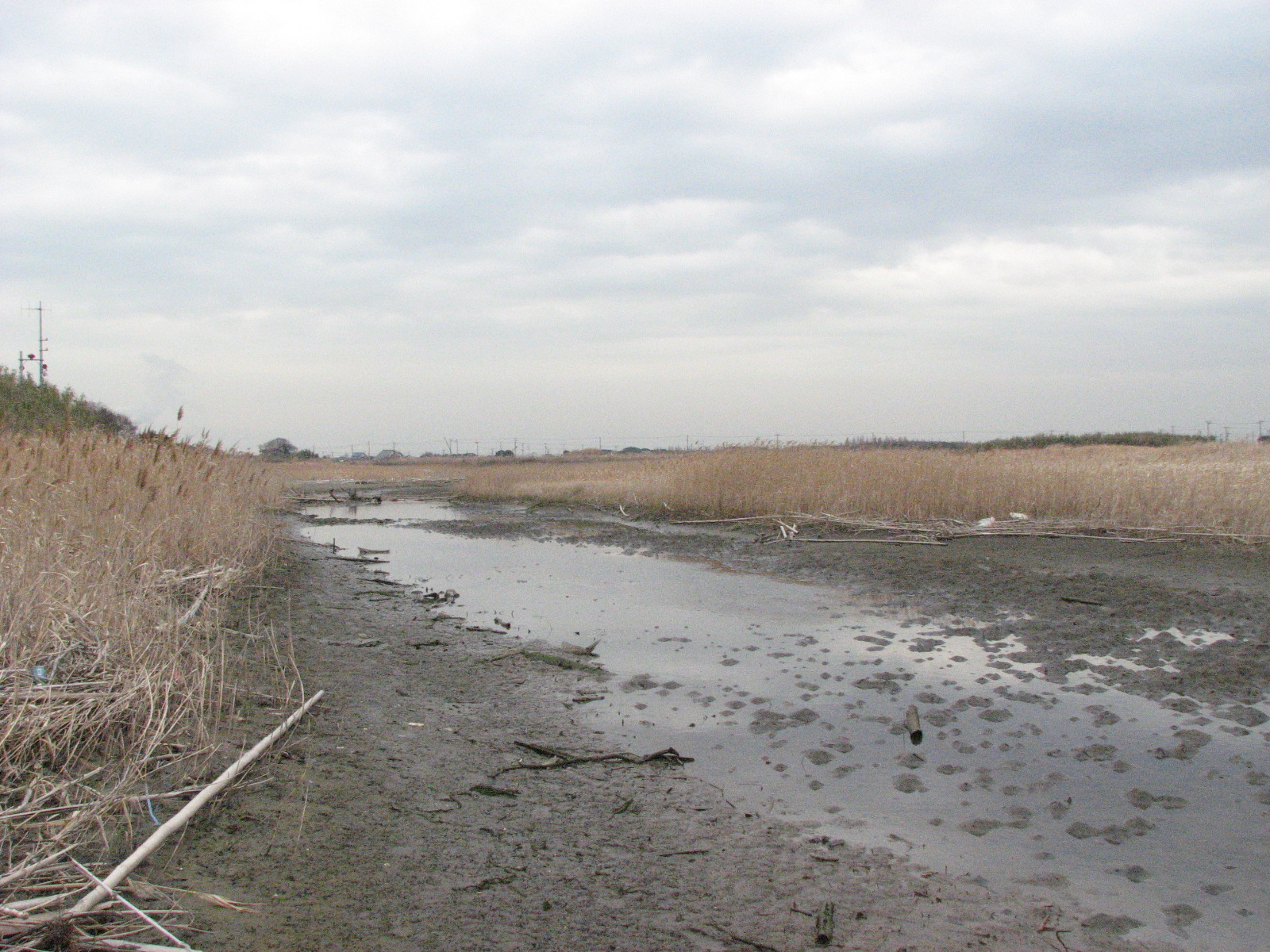 盤州干潟にいたる小櫃川河口付近のアシ原(東京湾)